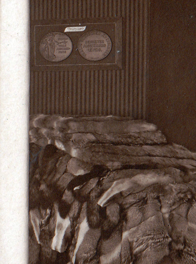 G. Nauck, Inh. Johannes Rohde, Leipziger Pelzwaren-Spezialhaus, Brühl 43. Verkaufsraum in der ersten Etage. Links eine Dekorationsbüste in einem Pelzmantel und mit einem Luchsfell über dem Arm; sowie ein modisch geschnittener Mantel auf einer Schneiderbüste, rechts daneben (Fuchs-?)Felle oder Felltafeln, darauf ein Hermelinmuff. In der Mitte ein Herrengehpelz mit Biberbesatz. Rechts an der Rückwand eine Auszeichnung (vergrößerte Medaillen-Kopien, Datum nicht erkennbar) zur Neuheiten-Ausstellung des Kürschnerhandwerks und eine weitere Urkunde. Im Hintergrund rechts ein größerer Stapel Coyotenfelle. Auf dem weißen Tisch ein Kragen, wahrscheinlich aus Amerikanischem Opossumfell, darum vier Stühle, Sitzfläche und Lehne mit Stoffbespannung. Rechts unten sieht man den oberen Teil einer mit elektrischen Kerzen beleuchteten Nische aus dem Erdgschoss. Links davon auf einer weißen Säule ein urnenartiges Gefäss. Die Konfektion befindet sich in Wandschränken mit Glastüren. Zwei elektrische Deckenleuchten.